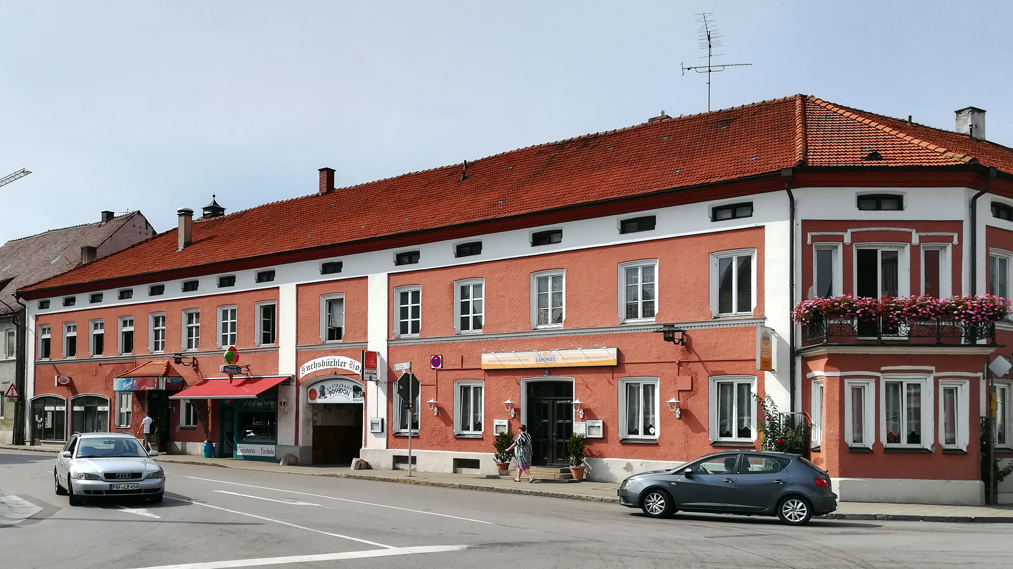 Zweigeschossiger, verputzter Walmdachbau mit Mezzaningeschoss Eckbodenerker mit Eisenbalkon und Fassadengliederung im Stil der späten Maximilianszeit, 1877